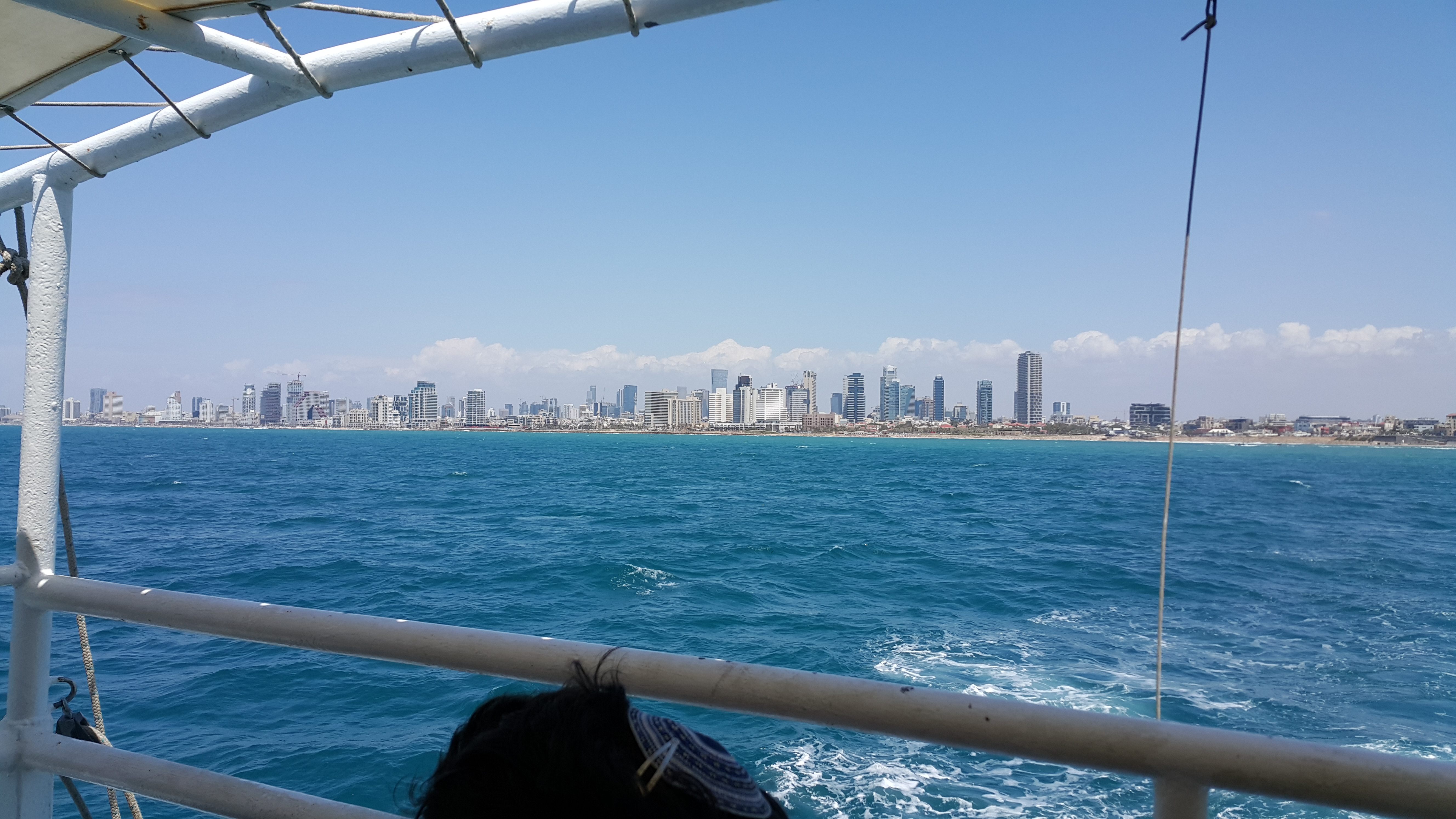 תל אביב מהים